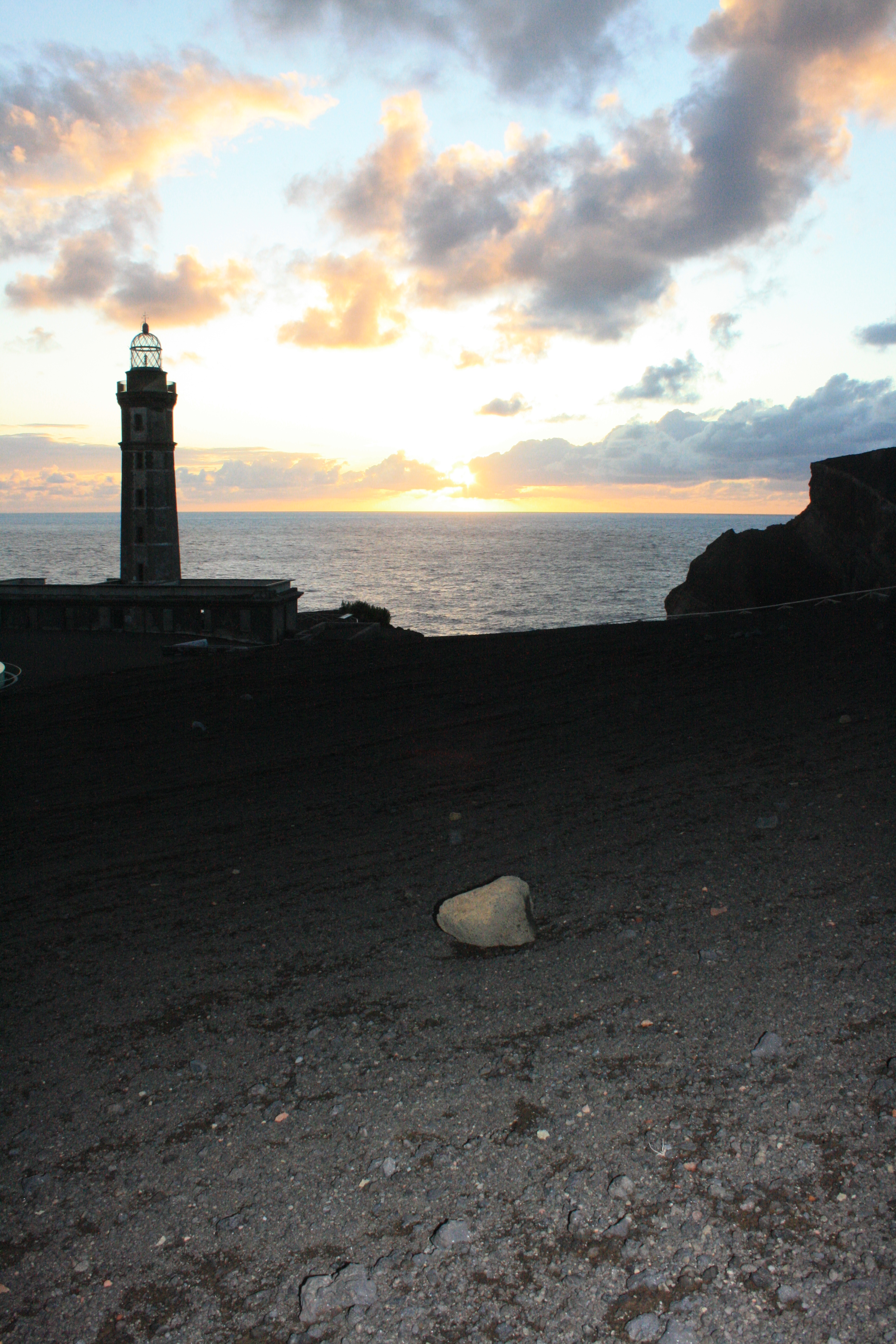 Farol dos Capelinhos. This file was uploaded for Wiki Loves Monuments in Portugal with the unique identifier 97026312.